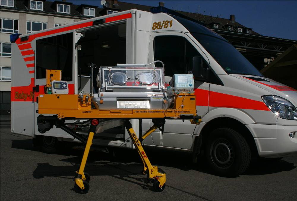 Inkubator auf dem Untergestell vor dem Fahrzeug (ASB Kassel-Nordhessen)